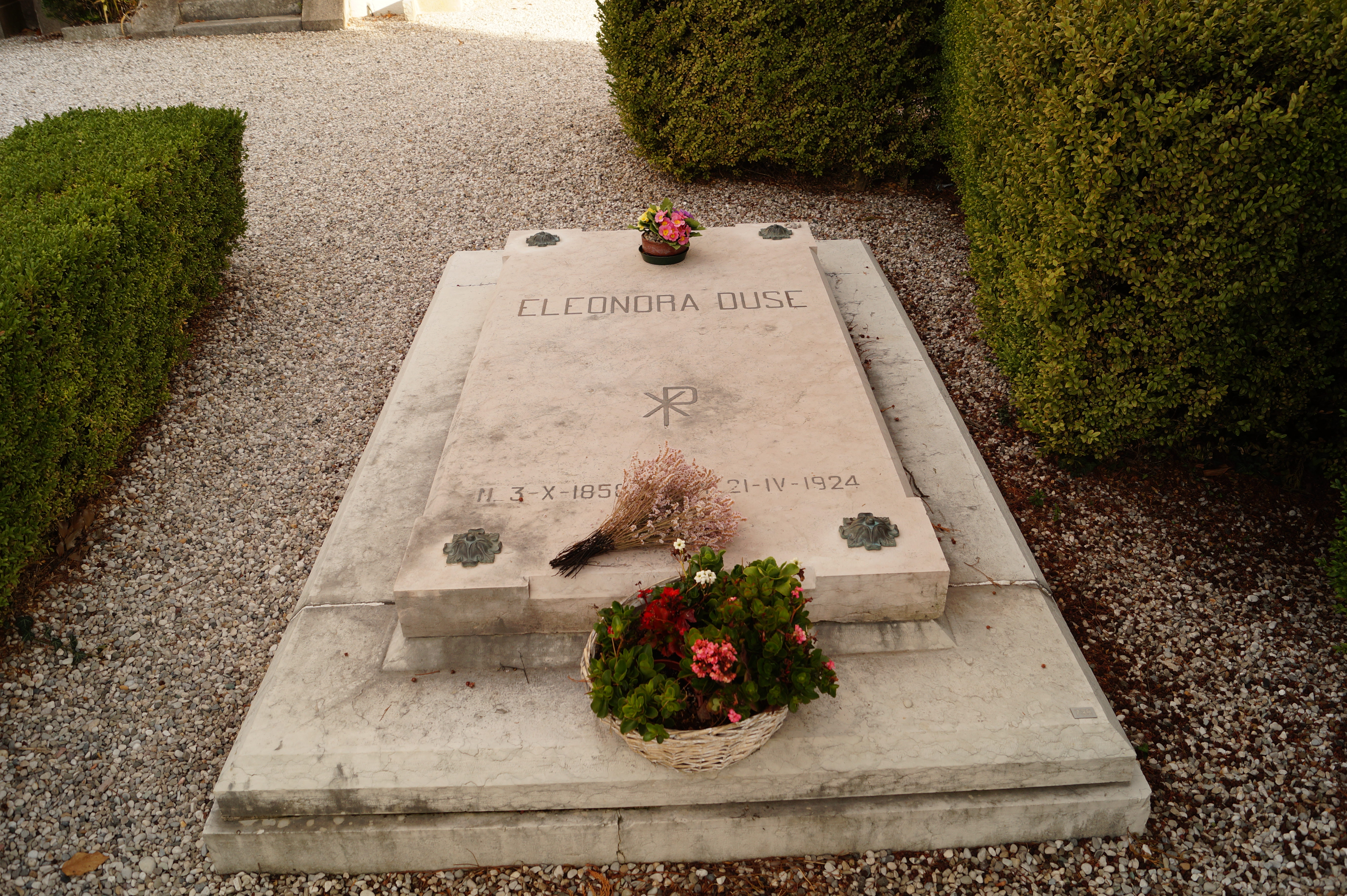 Particolare del cimitero di Sant'Anna: tomba di Eleonora Duse This is a photo of a monument which is part of cultural heritage of Italy.